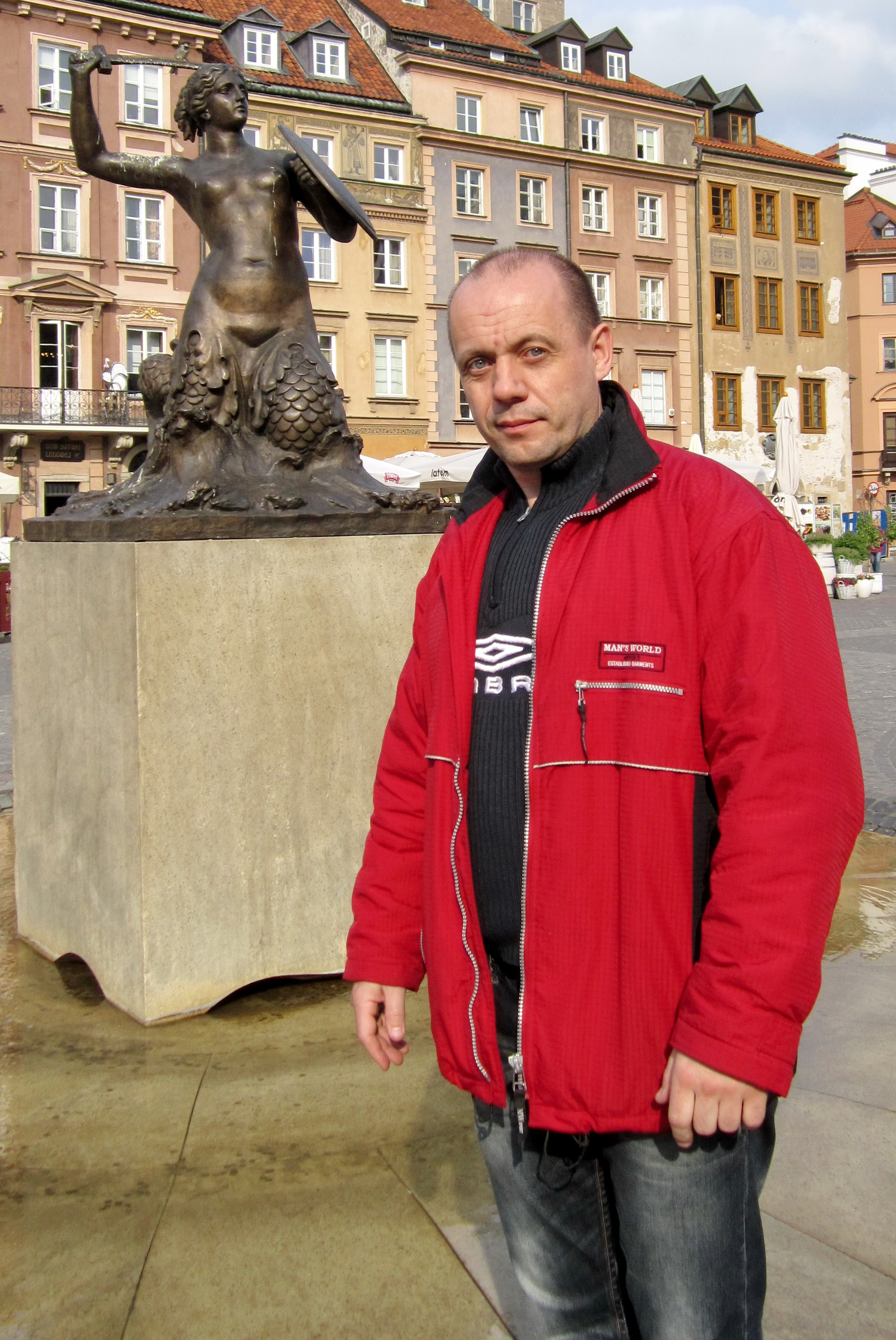 Pisarz Aleh Gruszecki obok Warszawskiej Syrenki